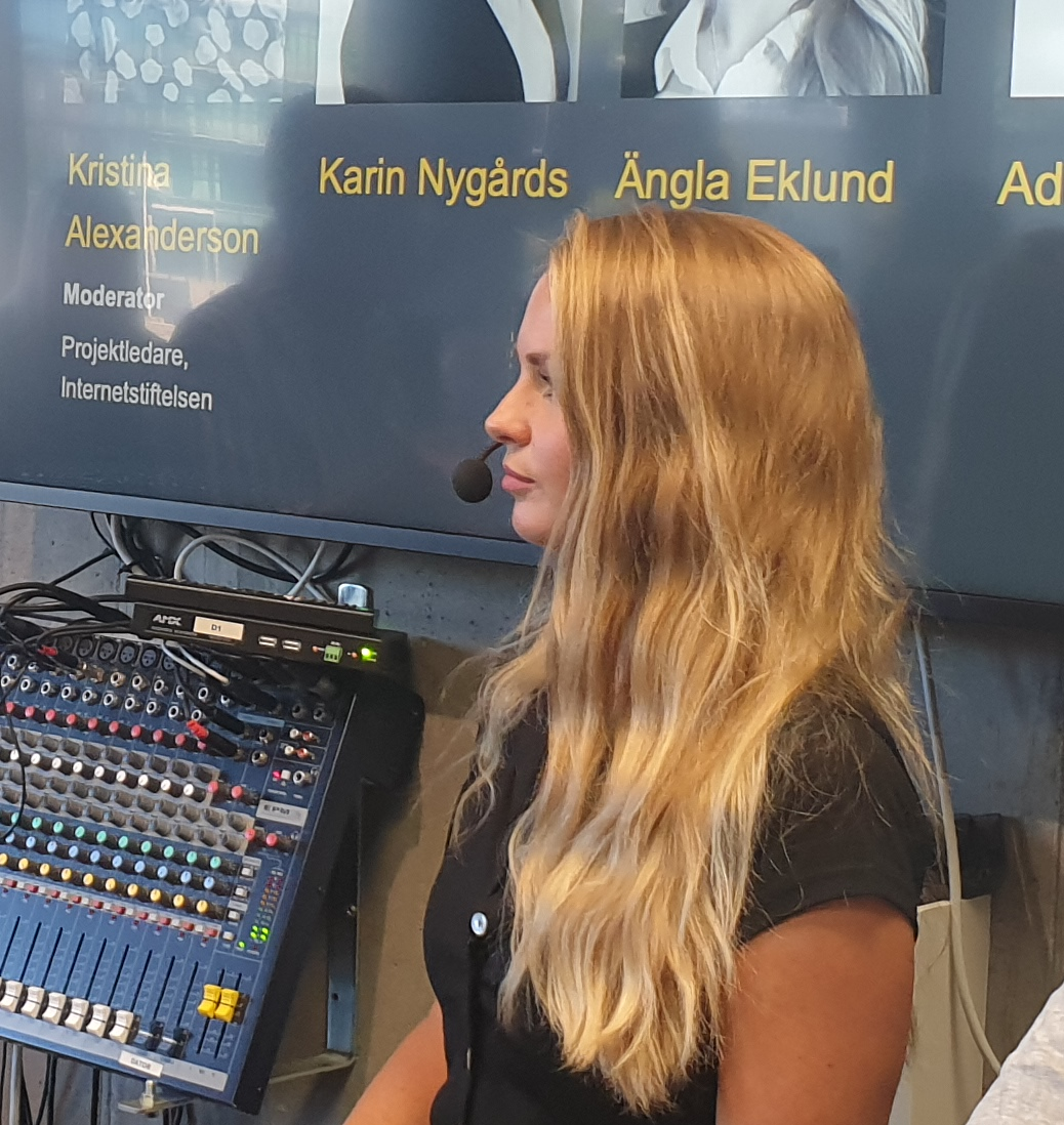 Ängla Eklund i en panel om barns integritet på nätet.